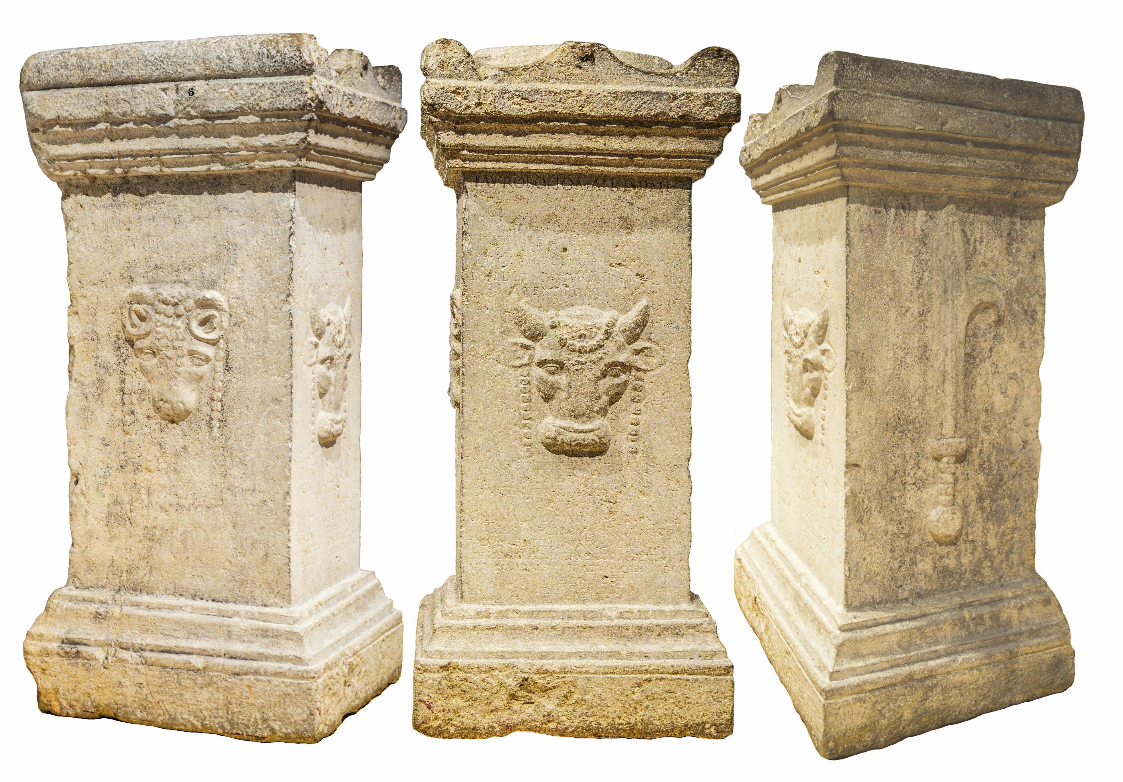 Autel taurobolique de Lyon daté de 160, musée gallo-romain de Fourvière, CIL XIII 1751. Face latérale gauche (tête de bélier), face centrale (tête de taureau et texte), face latérale droite (harpé, couteau de sacrifice). Montage de trois photographies.